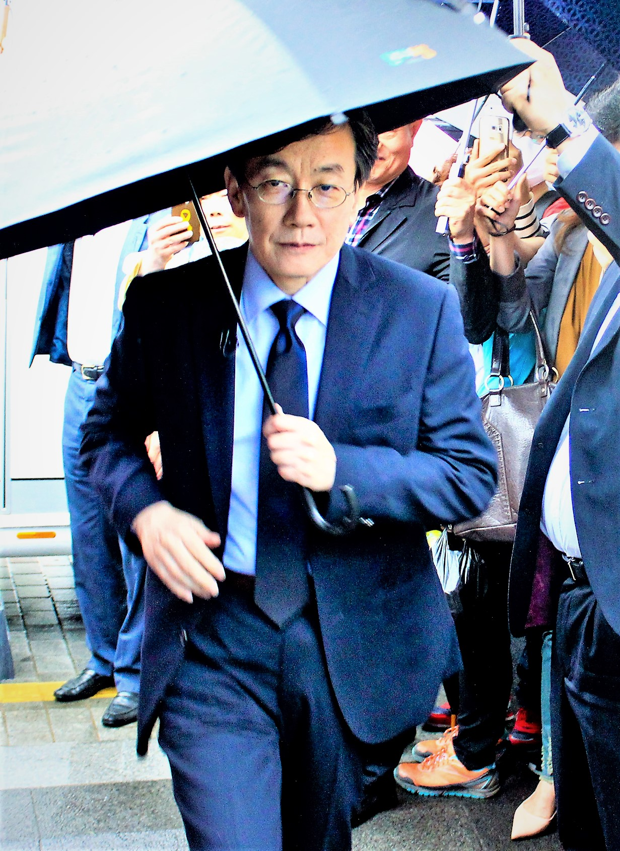 2017년 5월 9일 광화문 특설스튜디오로 출근하는 손석희